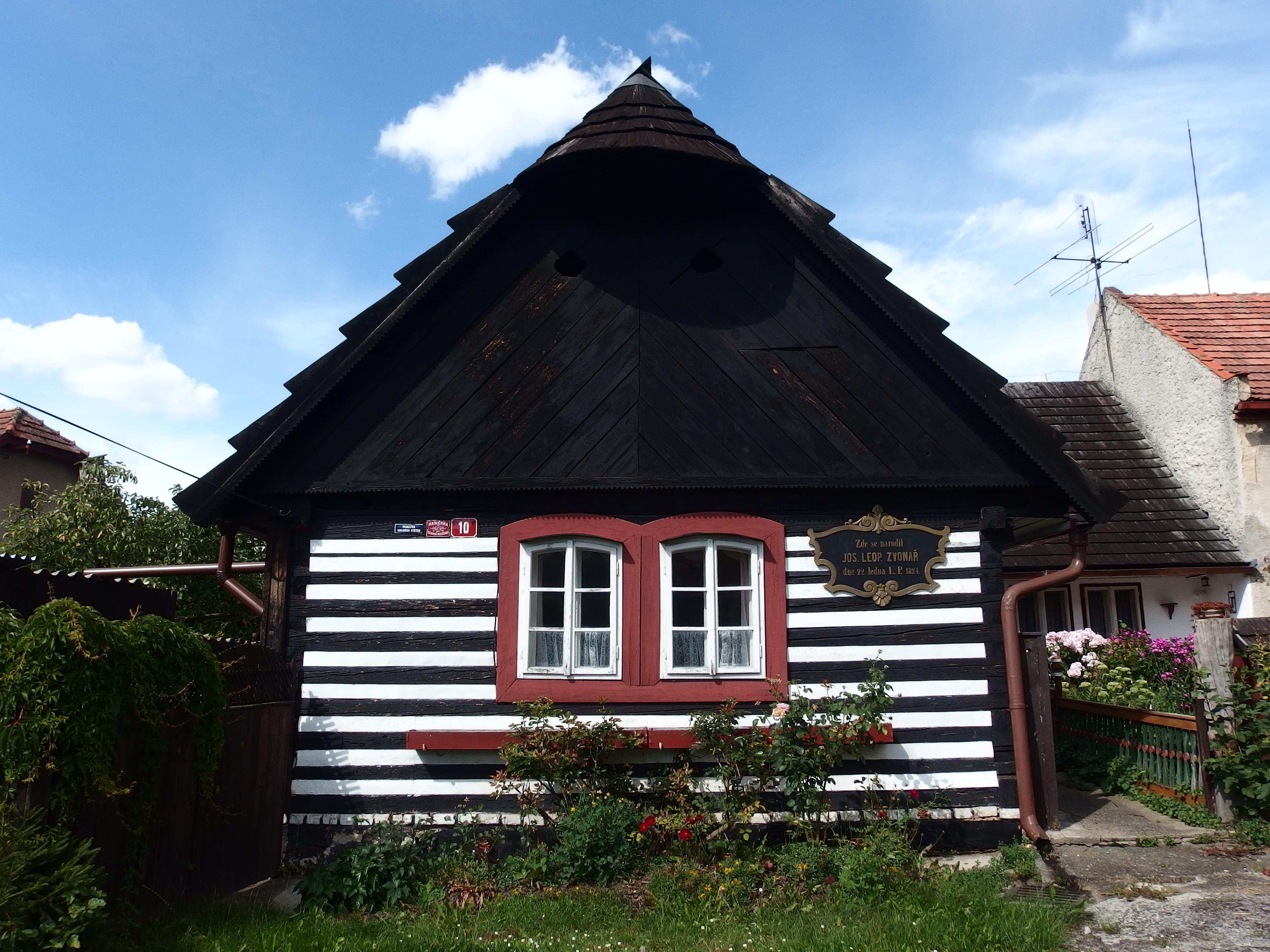 Rodný dům J. L. Zvonaře, Kublov 10, Kublov.